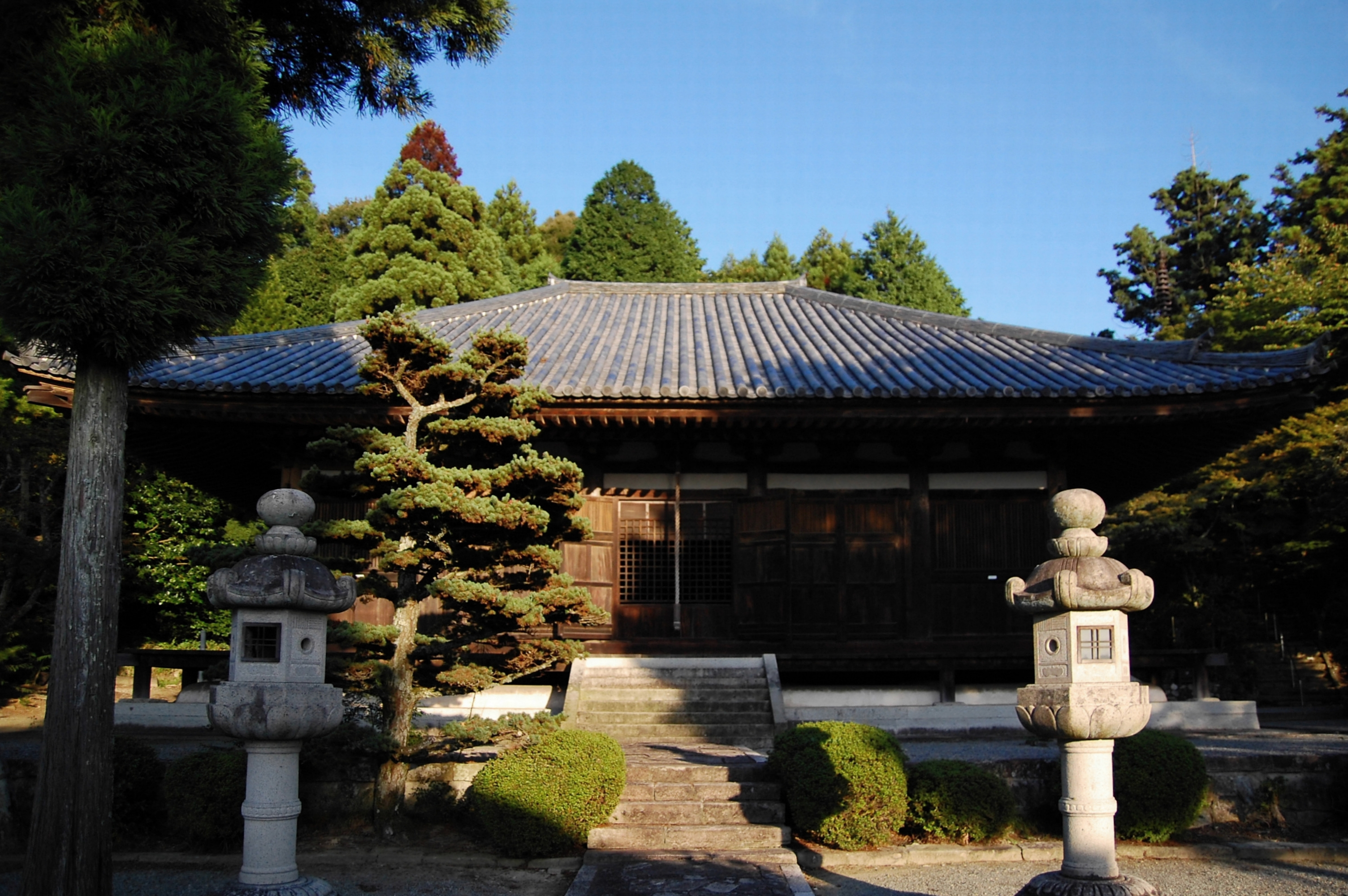 姑射山東光寺 (三木市)本堂（日本国指定の重要文化財）